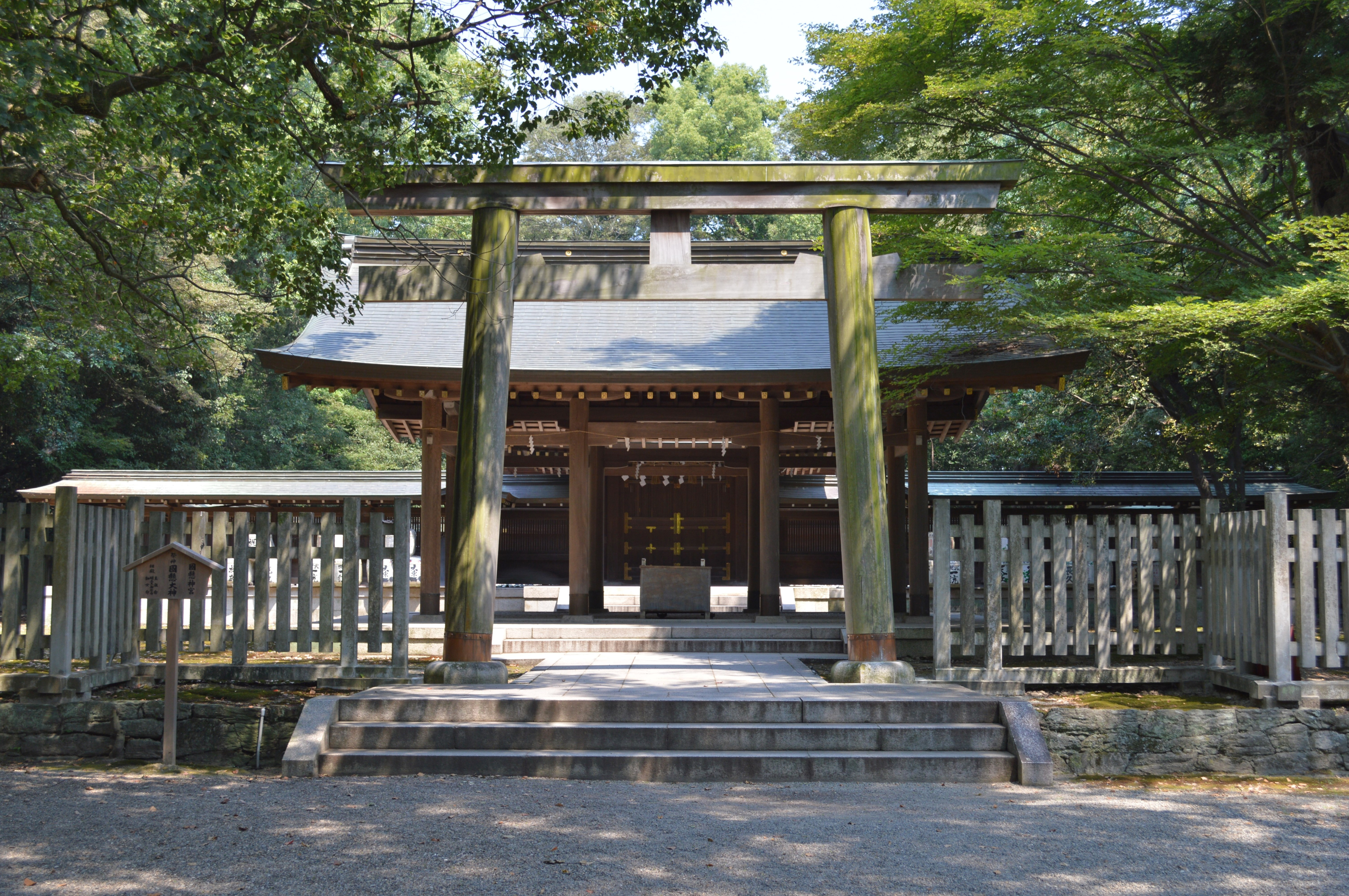 國懸神宮 鳥居